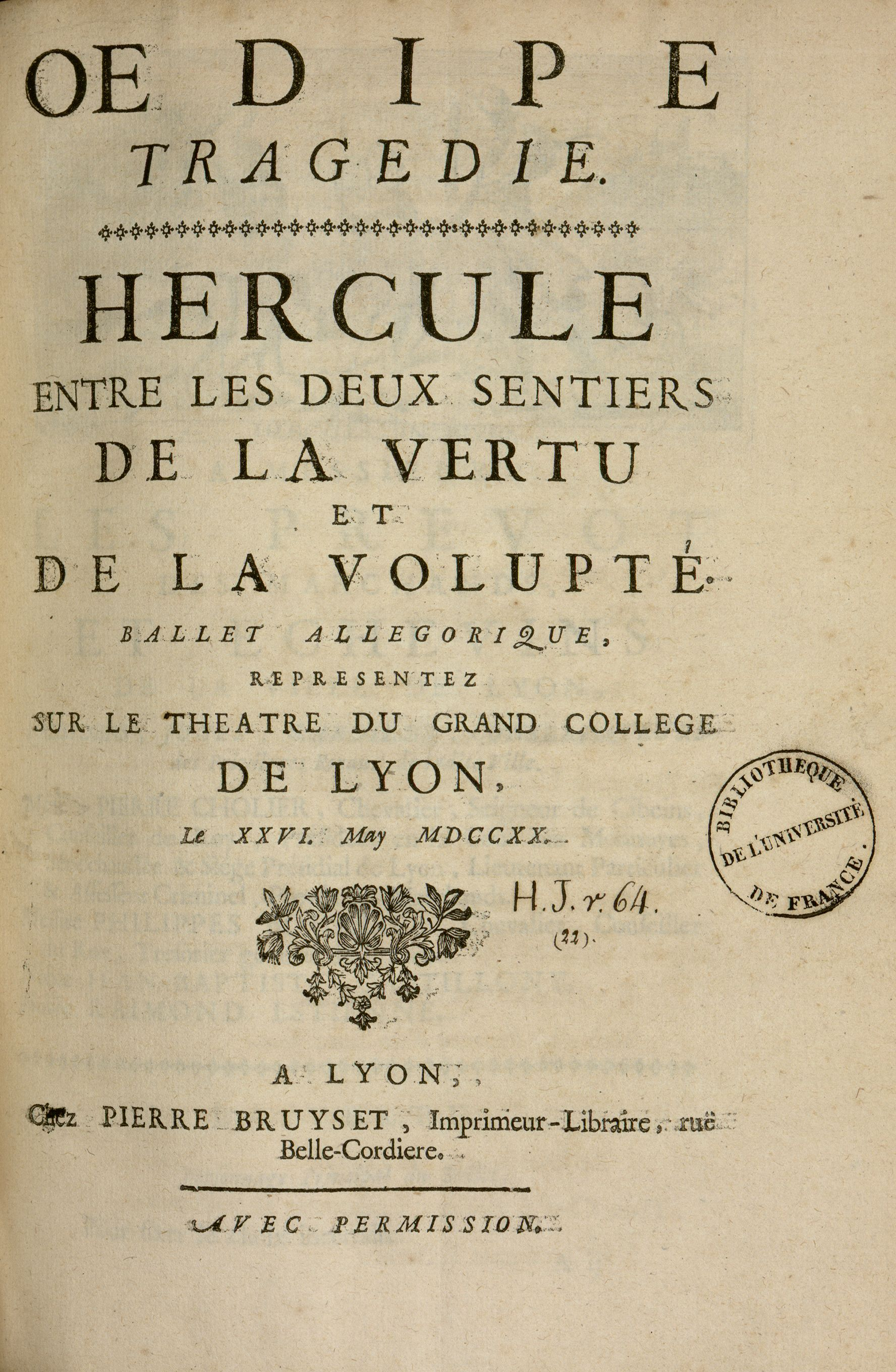 Oedipe tragedie. Hercule entre les deux sentiers de la vertu et de la volupté. Ballet allegorique, representez sur le theatre du Grand college de Lyon, le XXVI. may MDCCXX